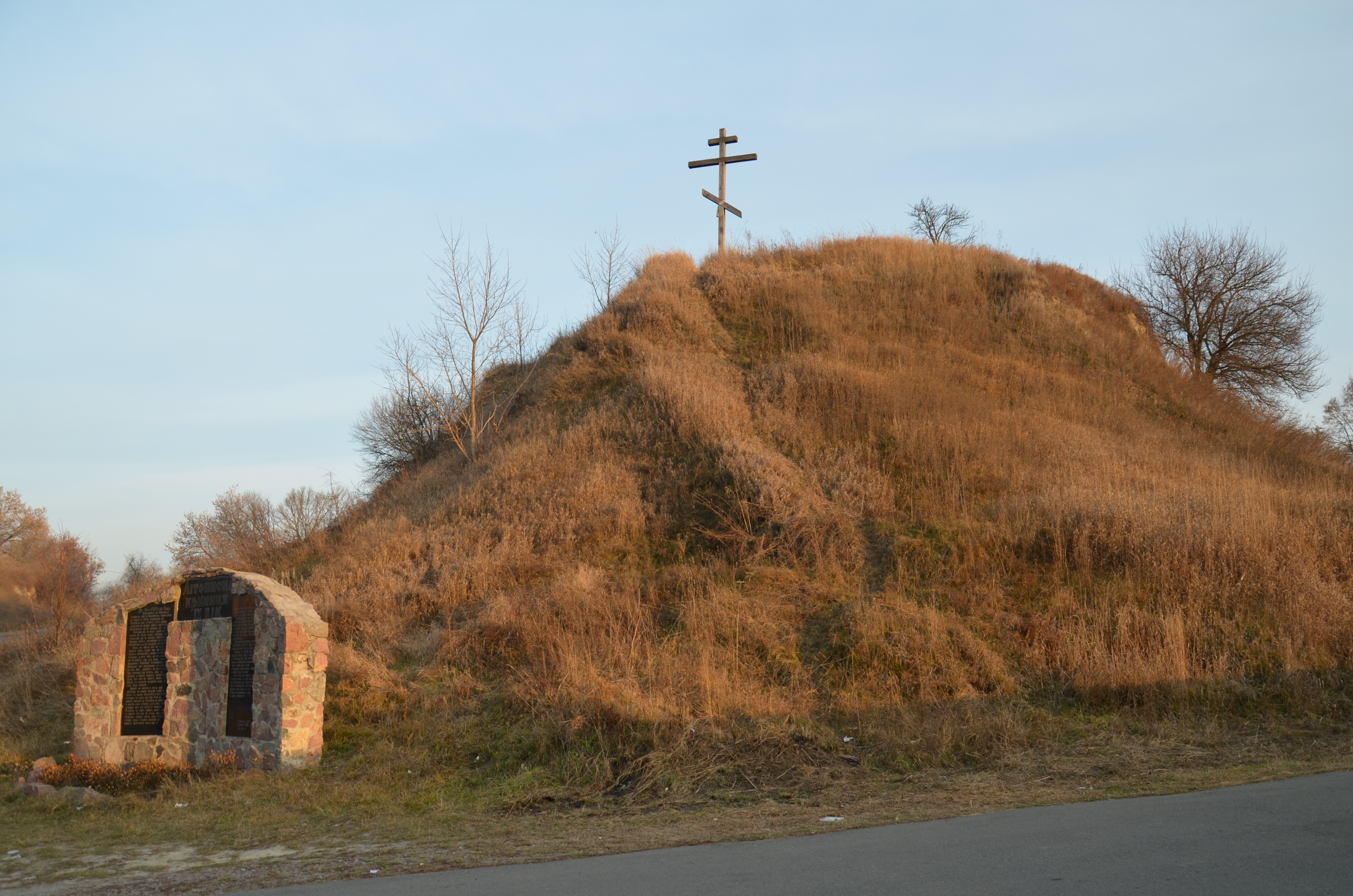 Городище літописного міста Білгорода і могильник, Білогородка